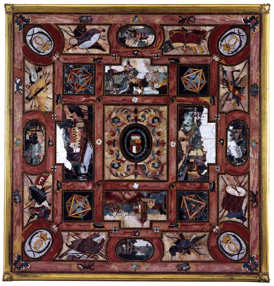 Deska stolu s erbem a monogramem Karla I. z Liechtenštejnu, 1620/23, velikost 93 x 89 cm, zdobení granáty.